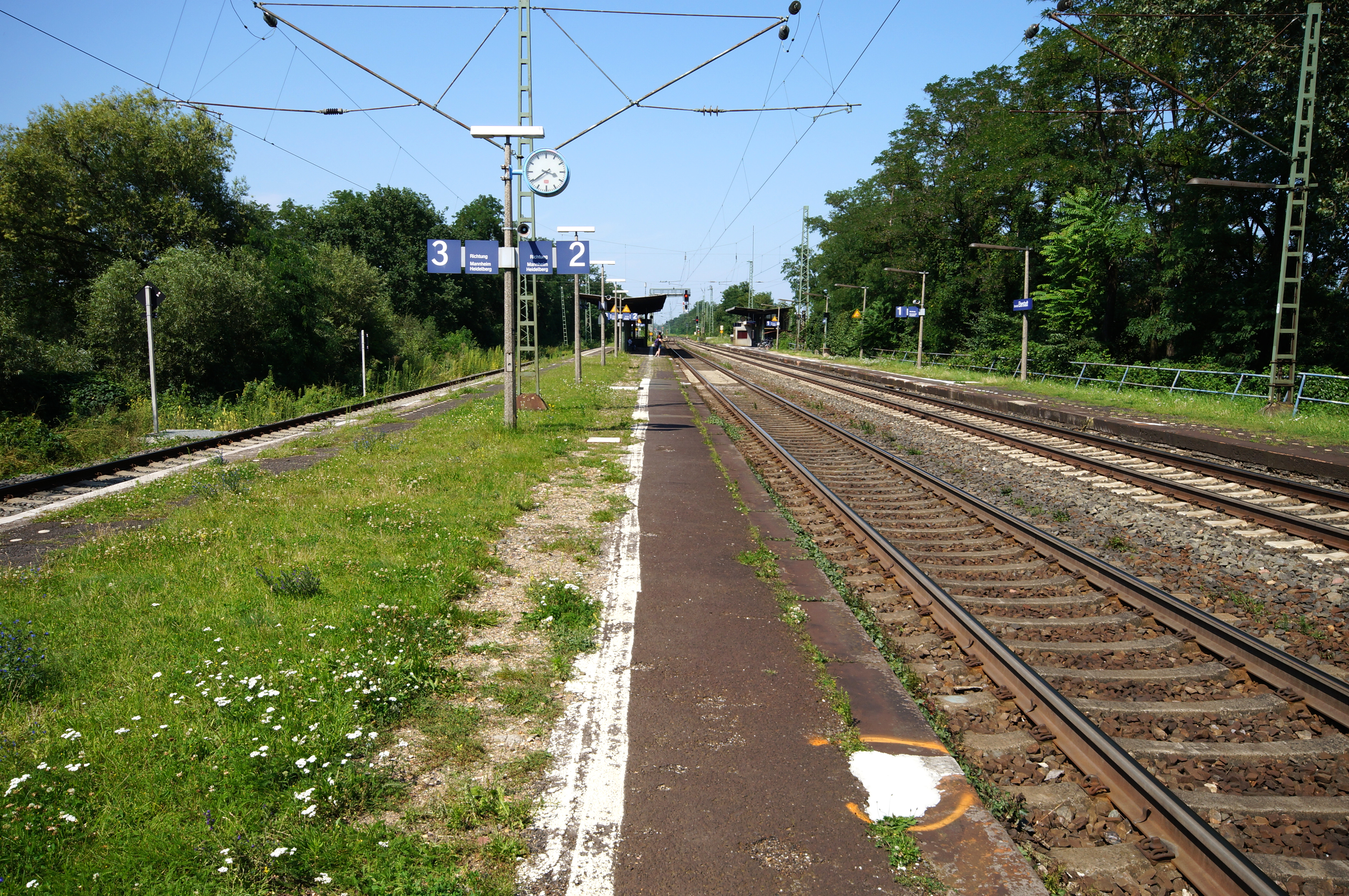 Die Bahnsteige des Bahnhofs von Darmstadt-Eberstadt